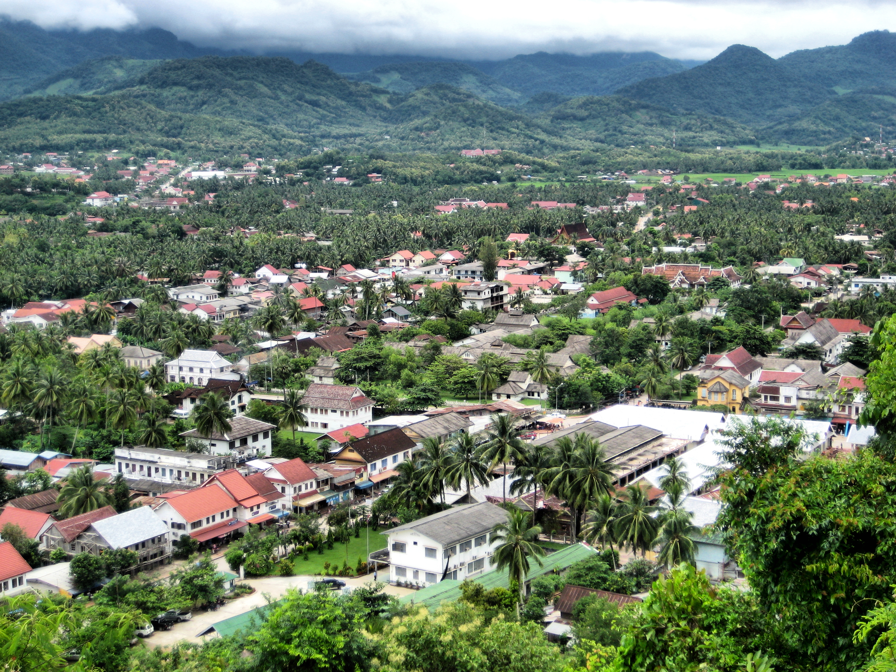 Luang Prabang Suburbs